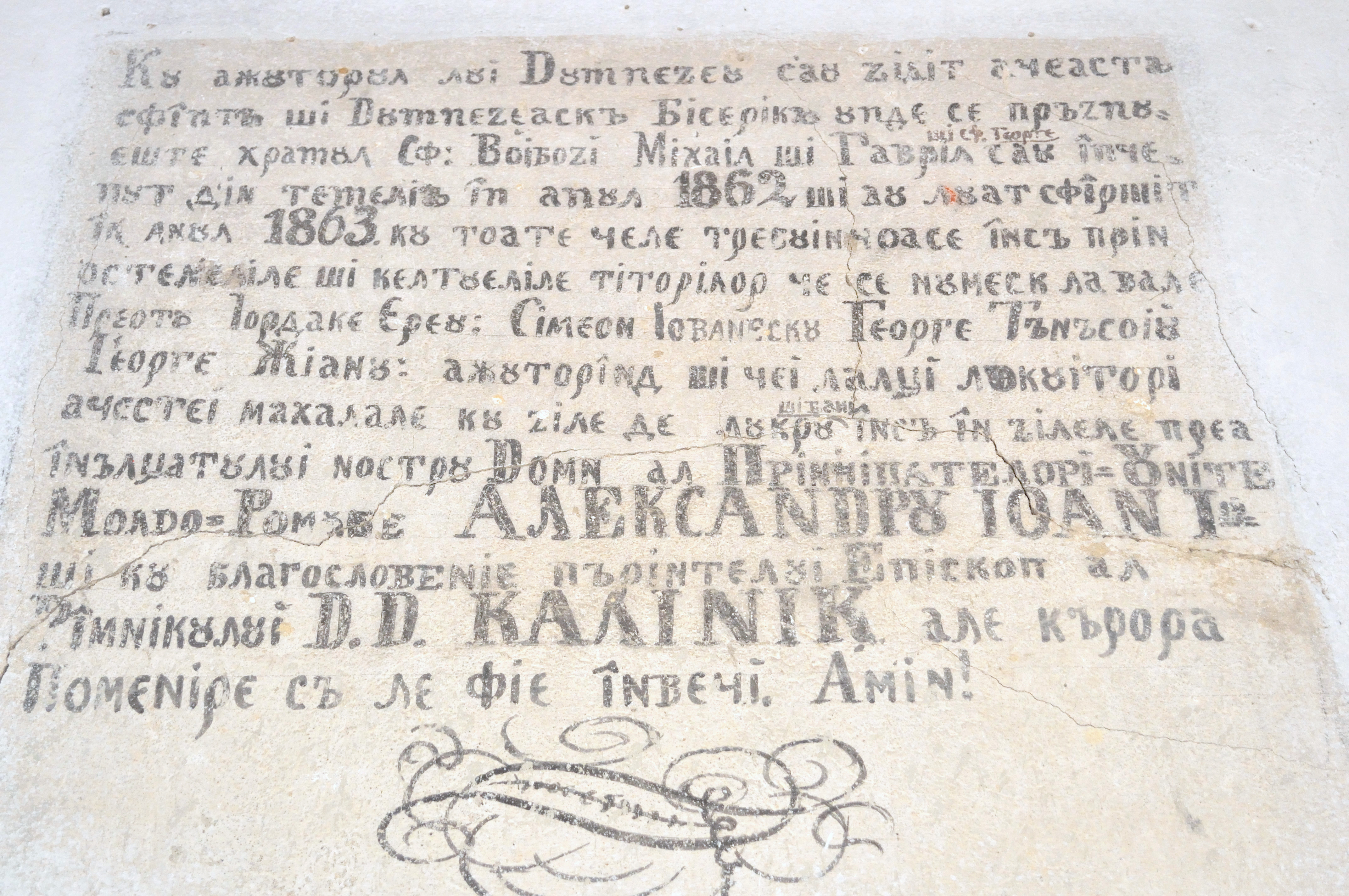 Biserica de lemn „Sfinții Voievozi” din Titerlești, județul Mehedinți